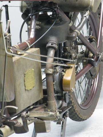 Auto-Fauteuil motorcycle exhaust system from 1908